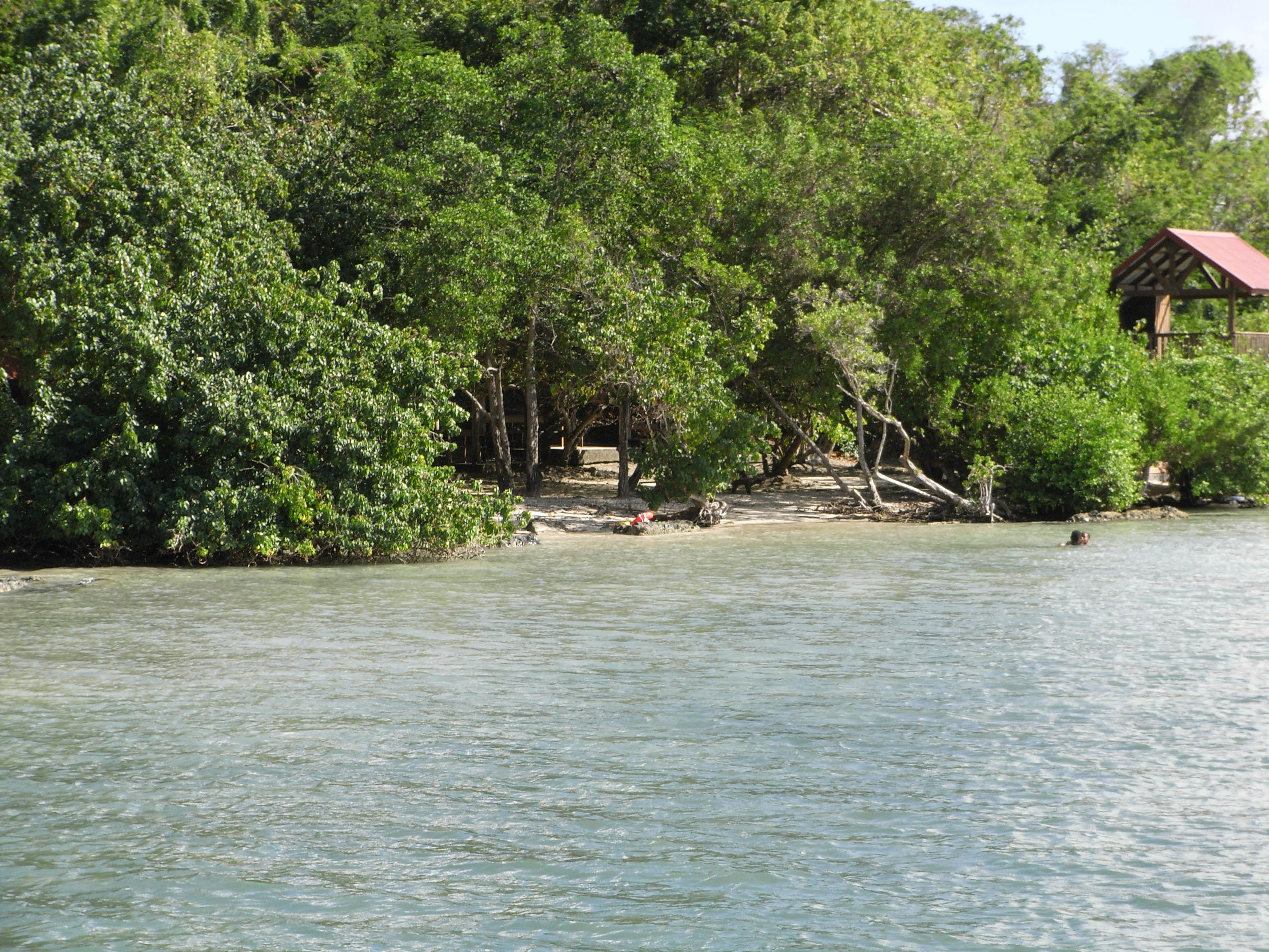 L'Îlet Madame situé dans le Havre du Robert en Martinique (France).